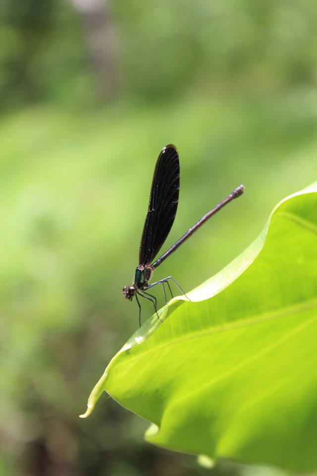 Hetaerina titia (Hembra)